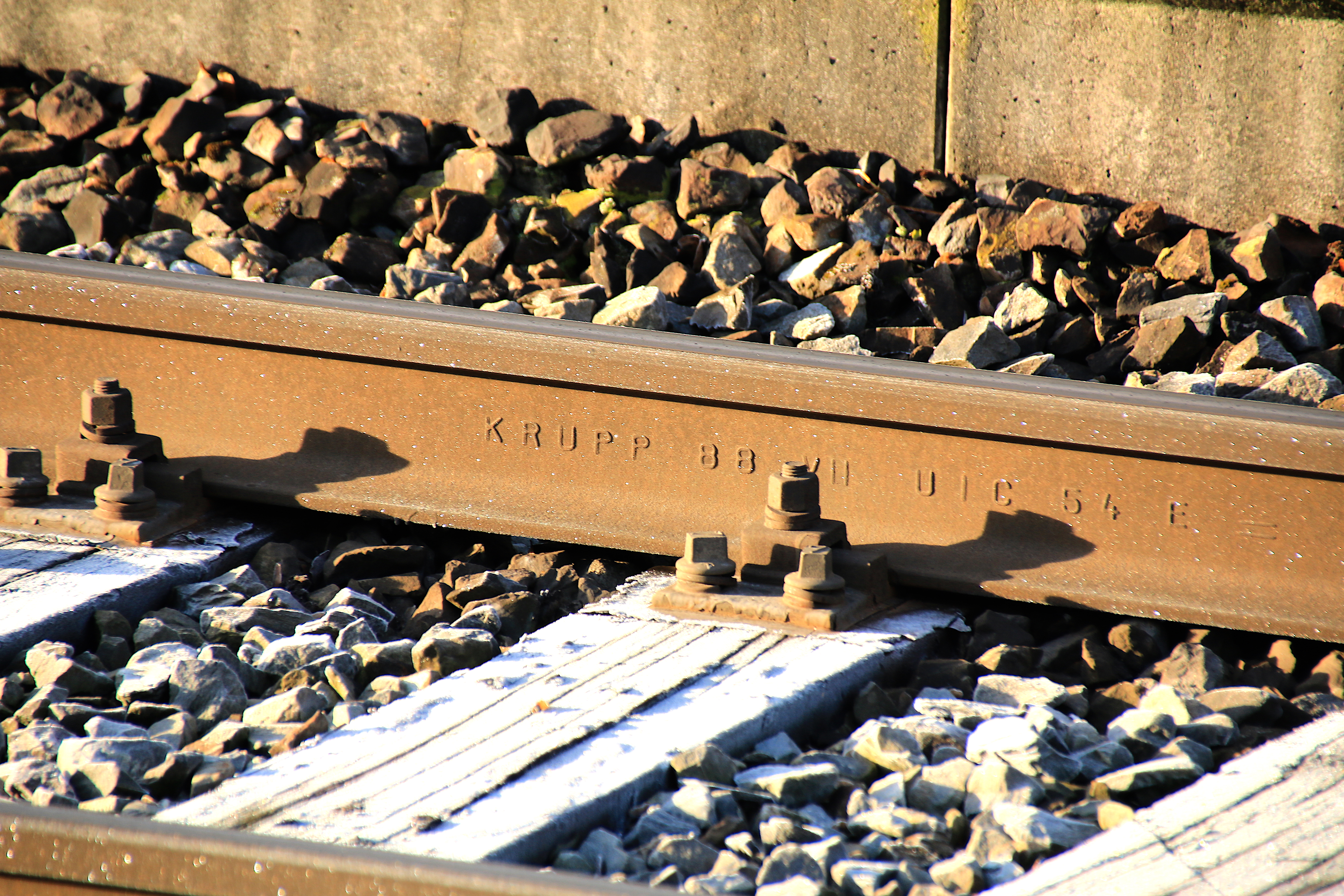 Eisenbahnschiene Krupp (SBB 2019)